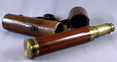 Tomas Zumalakarregi jeneralaren betaurrekoa.